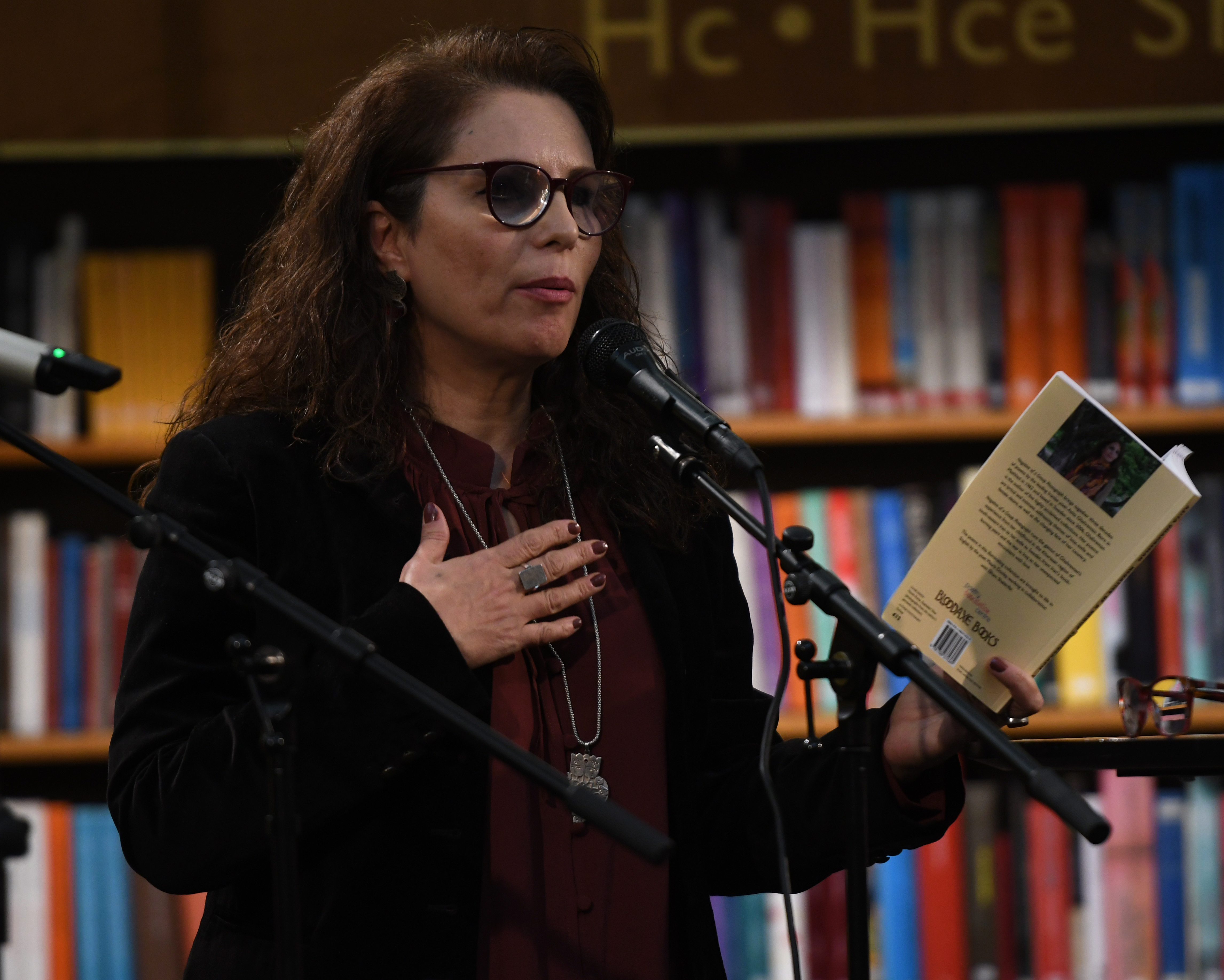 Poesimässan 2019, Stockholms stadsbibliotek. Poeten Azita Ghahreman.